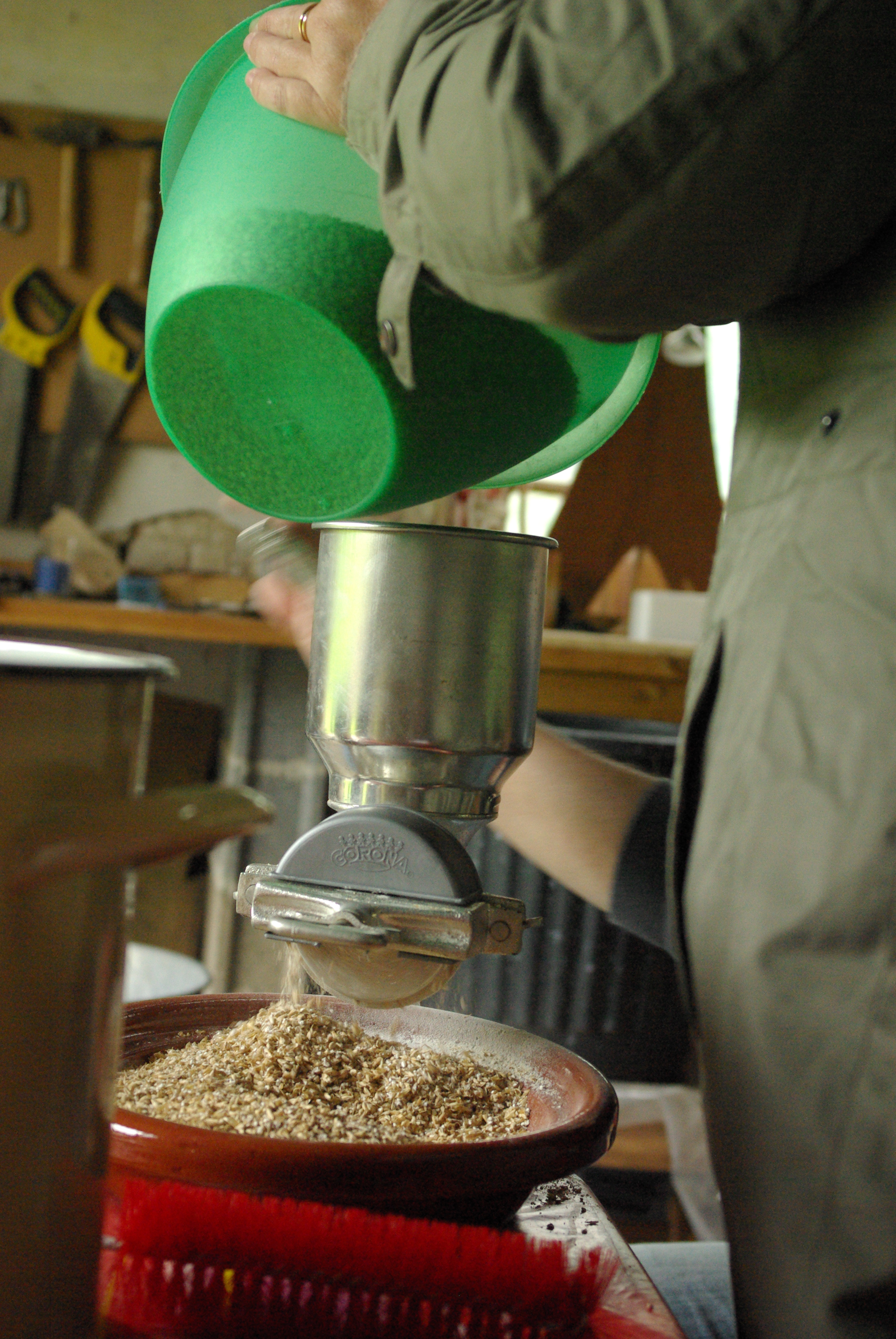 concassage du malt